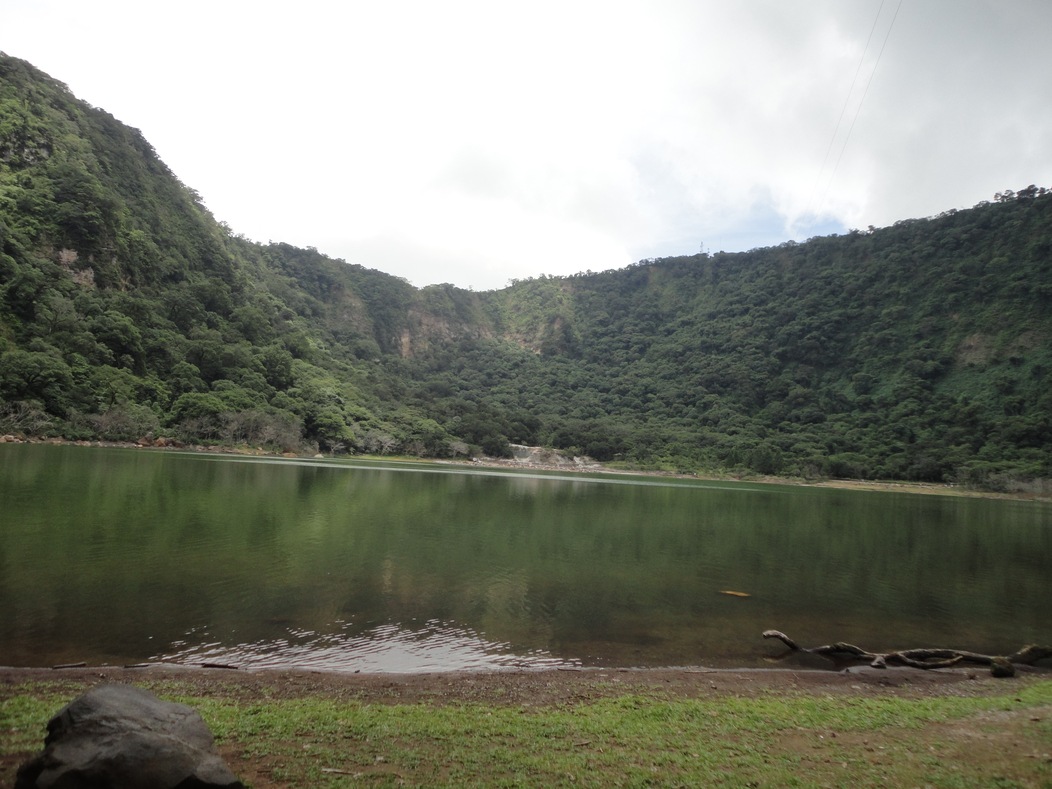 Laguna de Alegria, Usulutan